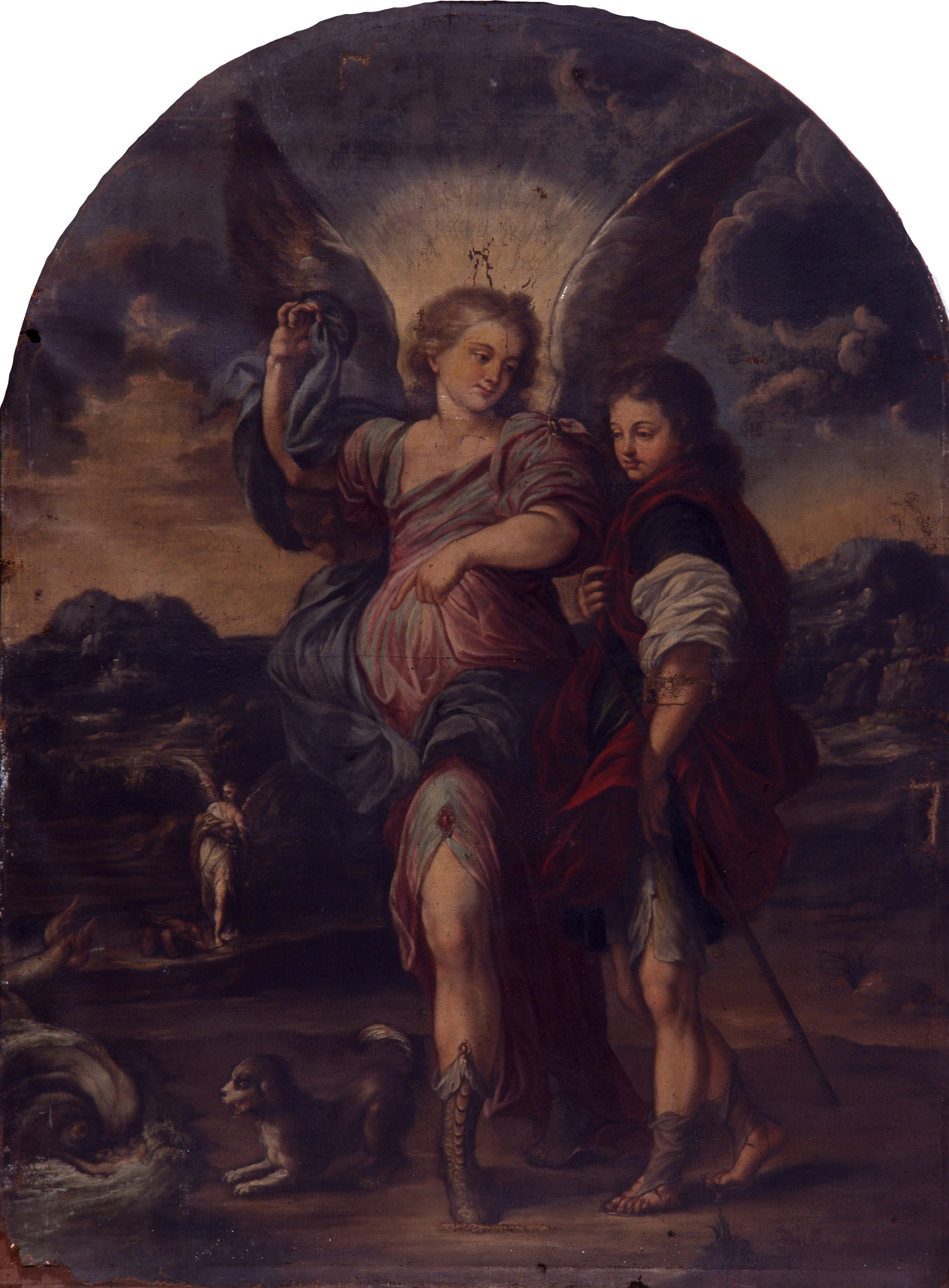 La obra representa el momento en que el arcángel San Rafael enseñó al joven Tobías el pez al que debía sacarle las entrañas y quemarlas para ahuyentar al demonio Asmodeo.